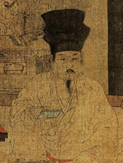 南唐元宗李璟